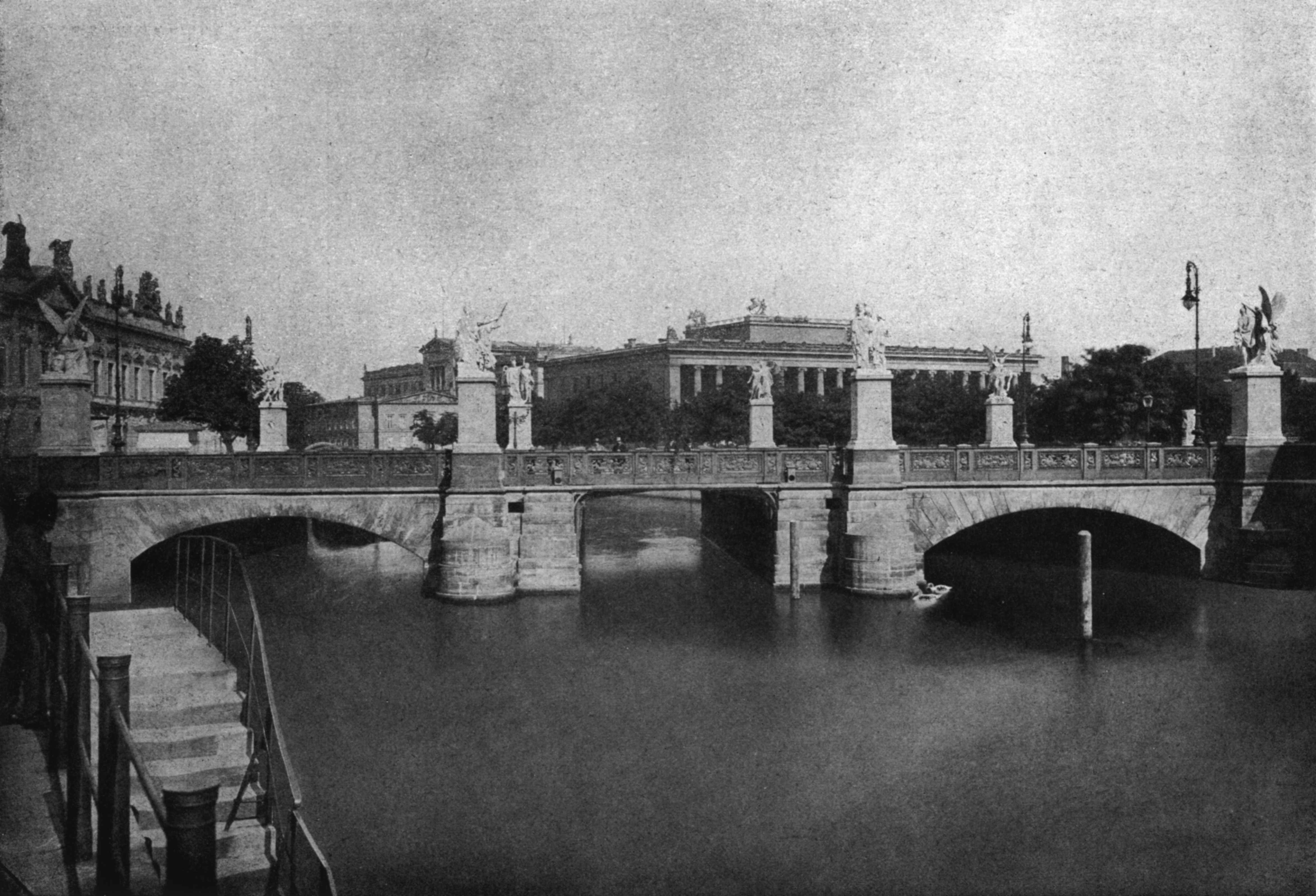 Berlin, Palace Bridge (Schlossbrücke), 1900